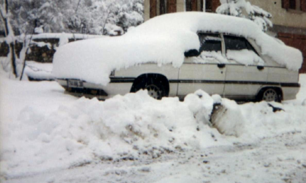 Une voiture sous la neige dans le Trièves lors de la chute de neige remarquable qui a touché Grenoble et sa région le 19 avril 1999. remark: Citroen BX ?